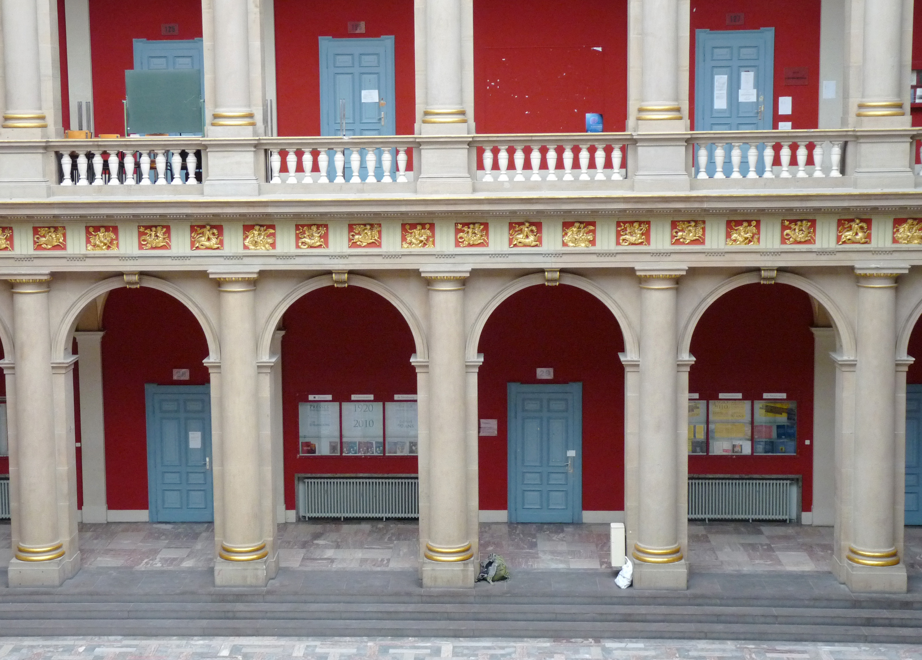 Aula du Palais Universitaire de Strasbourg. Siège des Presses universitaires de Strasbourg (au rez-de-chaussée).